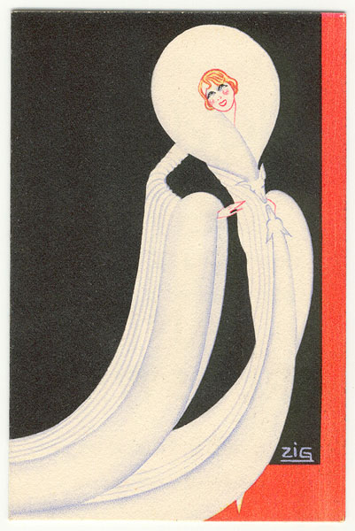 Publicité pour les fourrures André Brunswick, par Louis Gaudin dit Zig. Le personnage est Mistinguett.